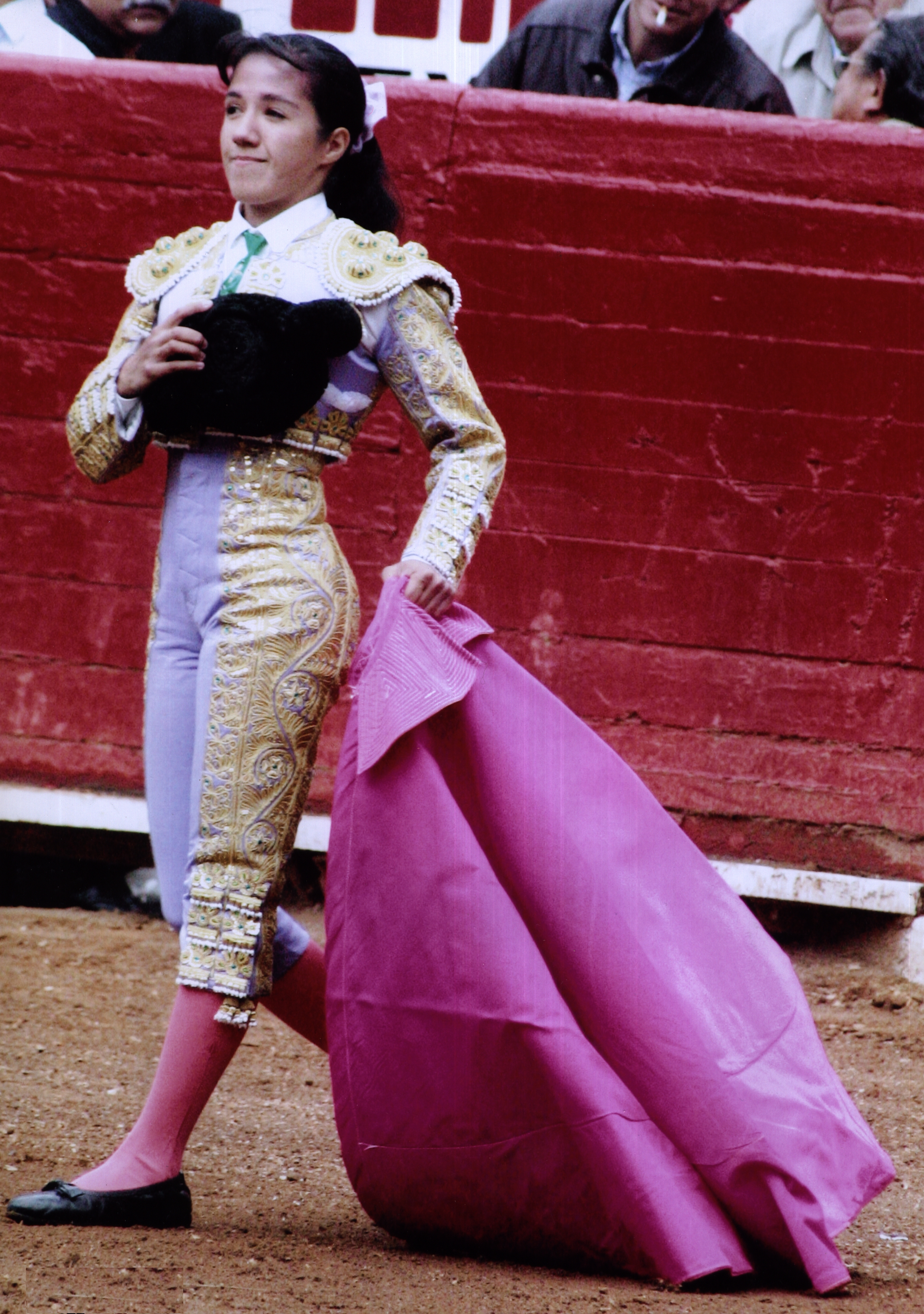 Hilda Tenorio recibiendo una ovacion en la Plaza Mexico.